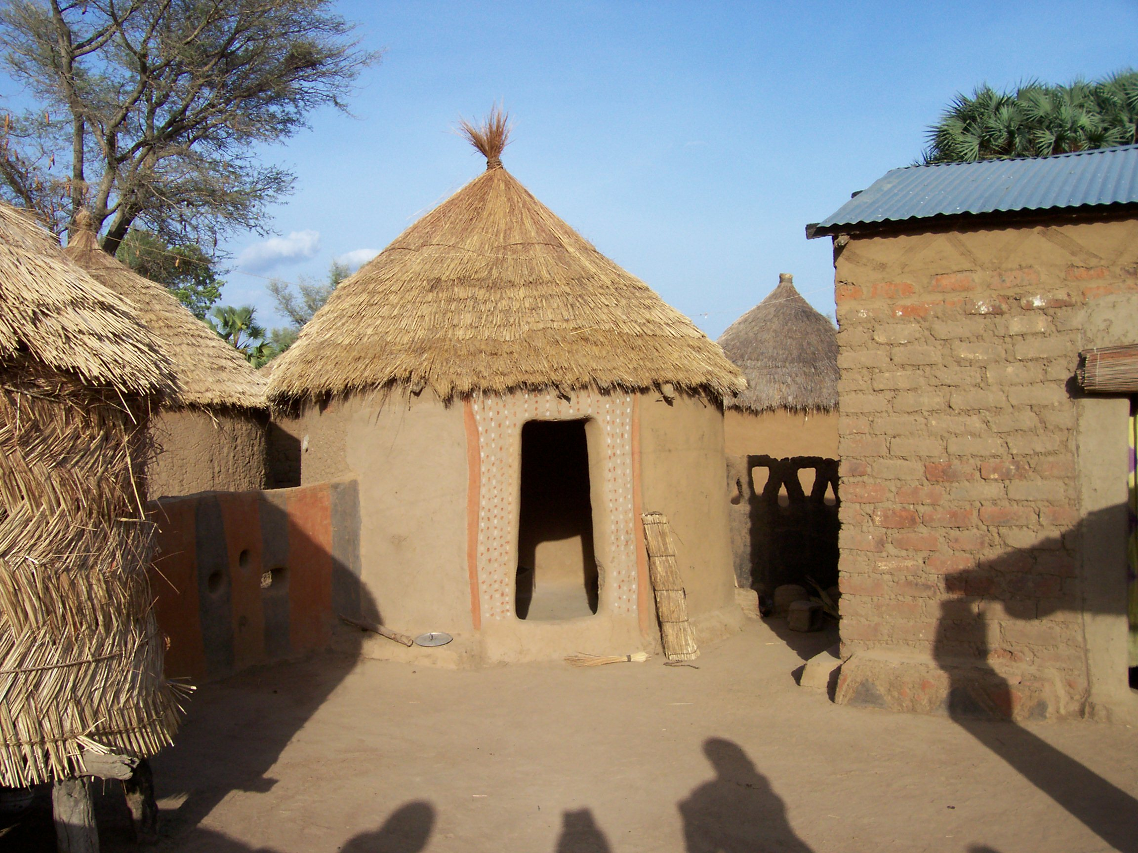 Foto personale di una casa masa in Ciad (Koumi)